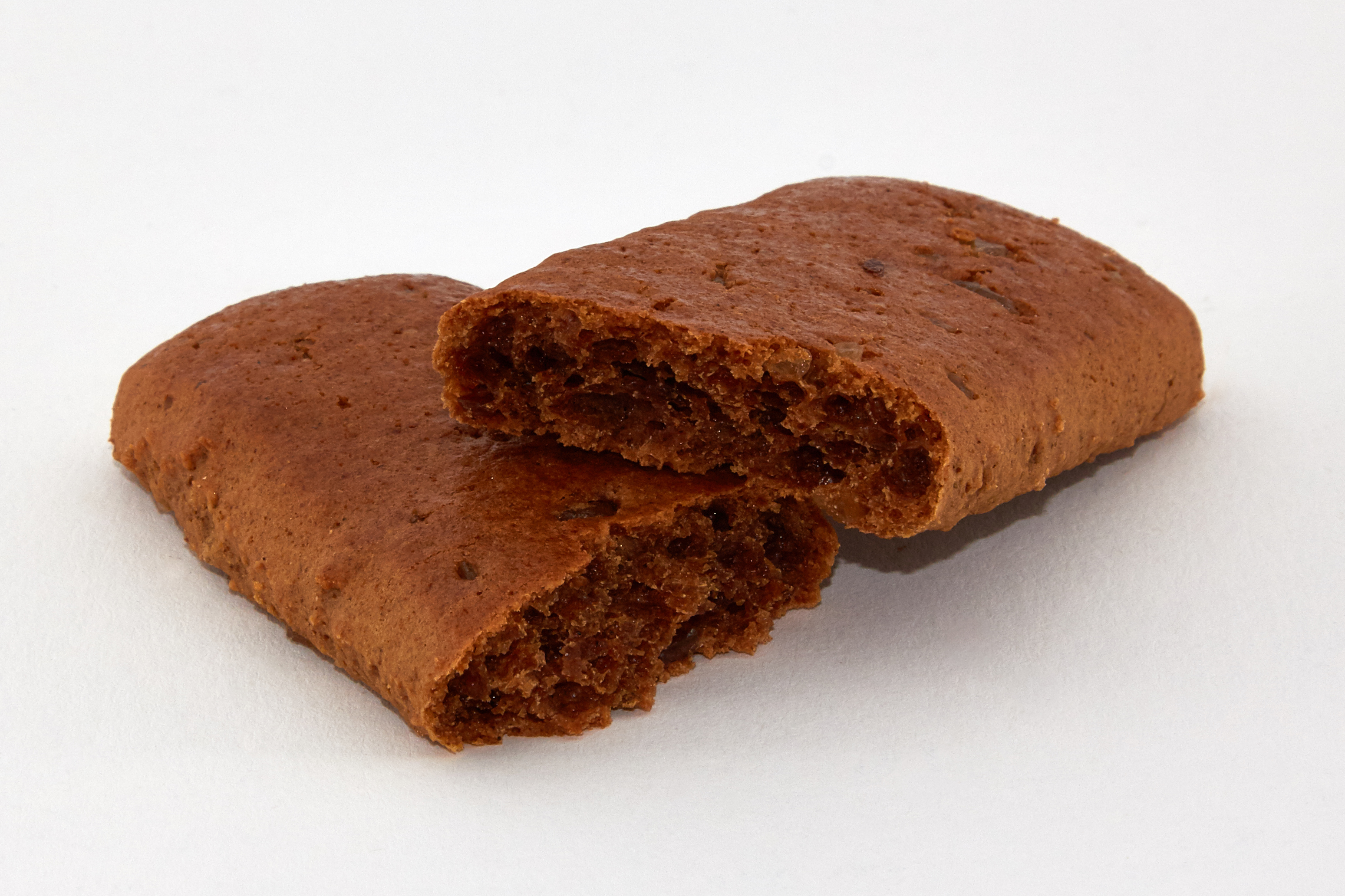 Aachener Kräuterprinten, Hersteller: Schultheis GmbH